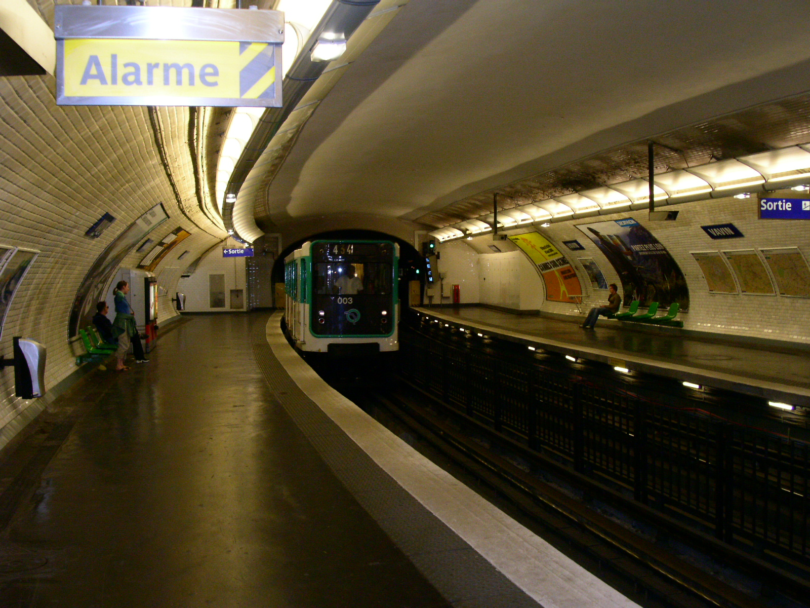 Picture taken in Porte de Clignancourt - Porte d'Orléans line. Au revoir Paris.